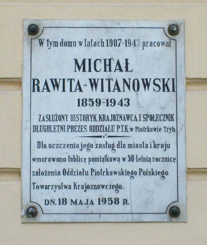 Piotrków Trybunalski Tablica upamiętniająca działalność Michała Rawity-Witanowskiego